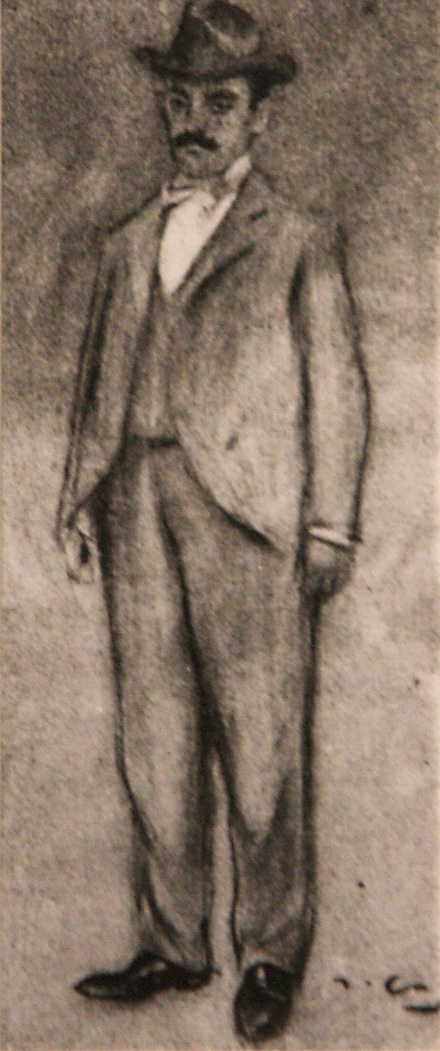 Retrat de Pere Coromines i Montanya, obra de Ramon Casas.